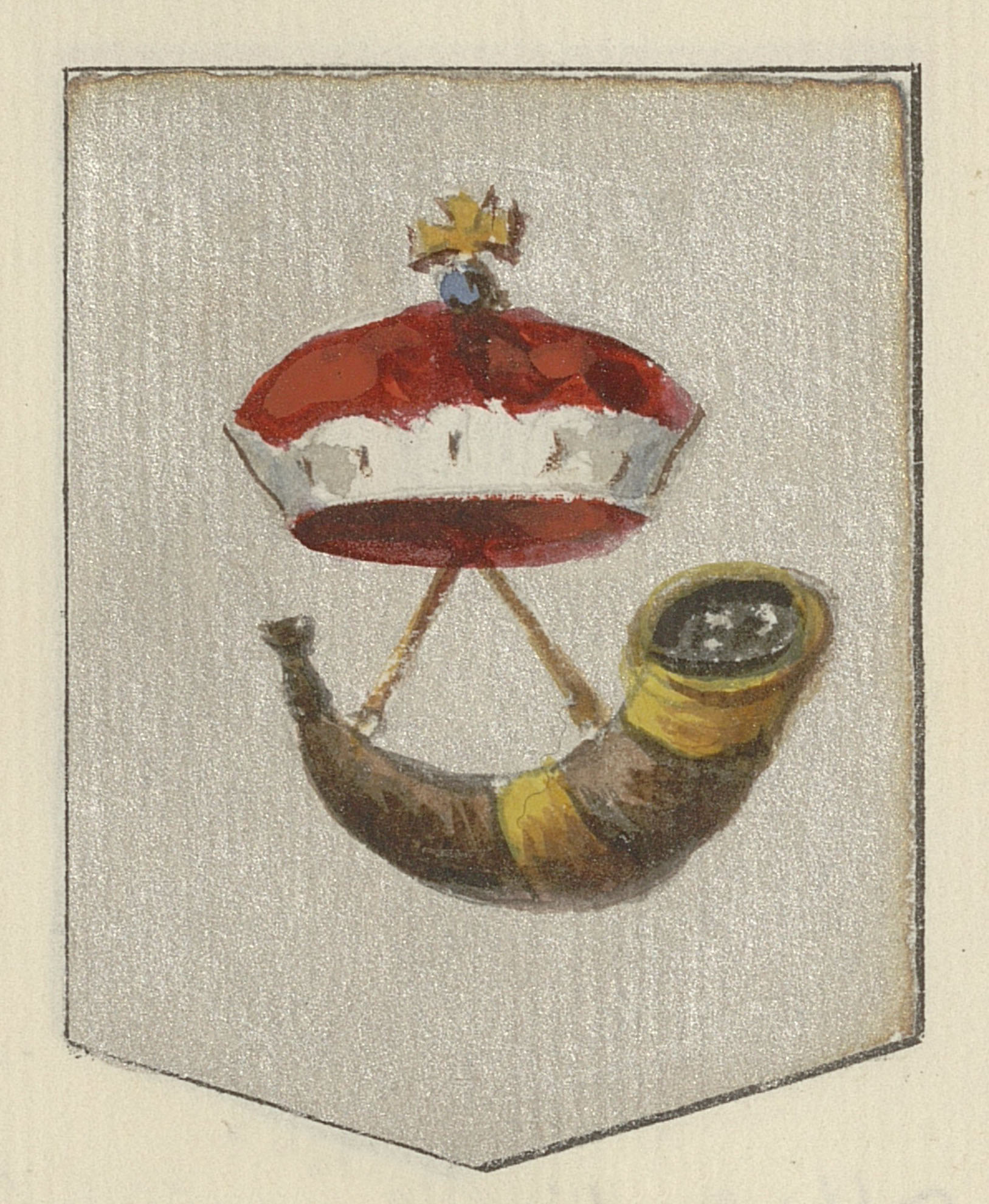 Беларуская (тарашкевіца): Клецак (Klecak). Мескі герб